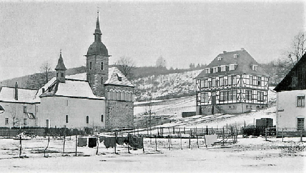 Katholische St. Augustinus-Pfarrkirche und Theresienstift in Listernohl, Nordostansicht. In den 1960er Jahren wegen dem Bau der Biggetalsperre abgerissen.